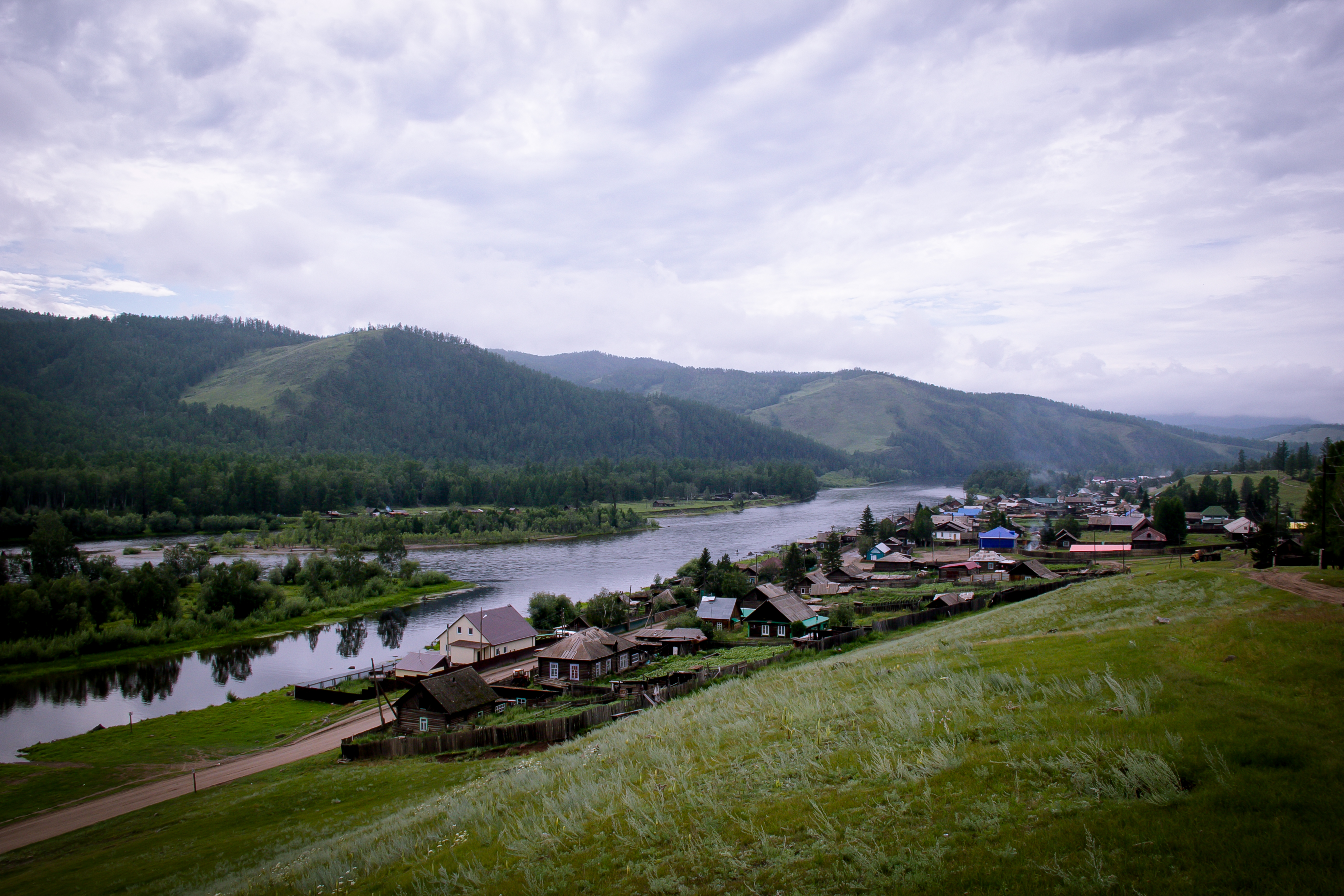 Село Салдам, Тоджинского района РТ